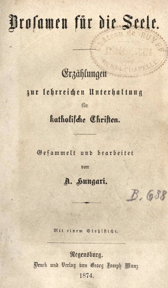 Anton Hungari, katholischer Priester in Frankfurt (+1881), Publzist und Schriftsteller